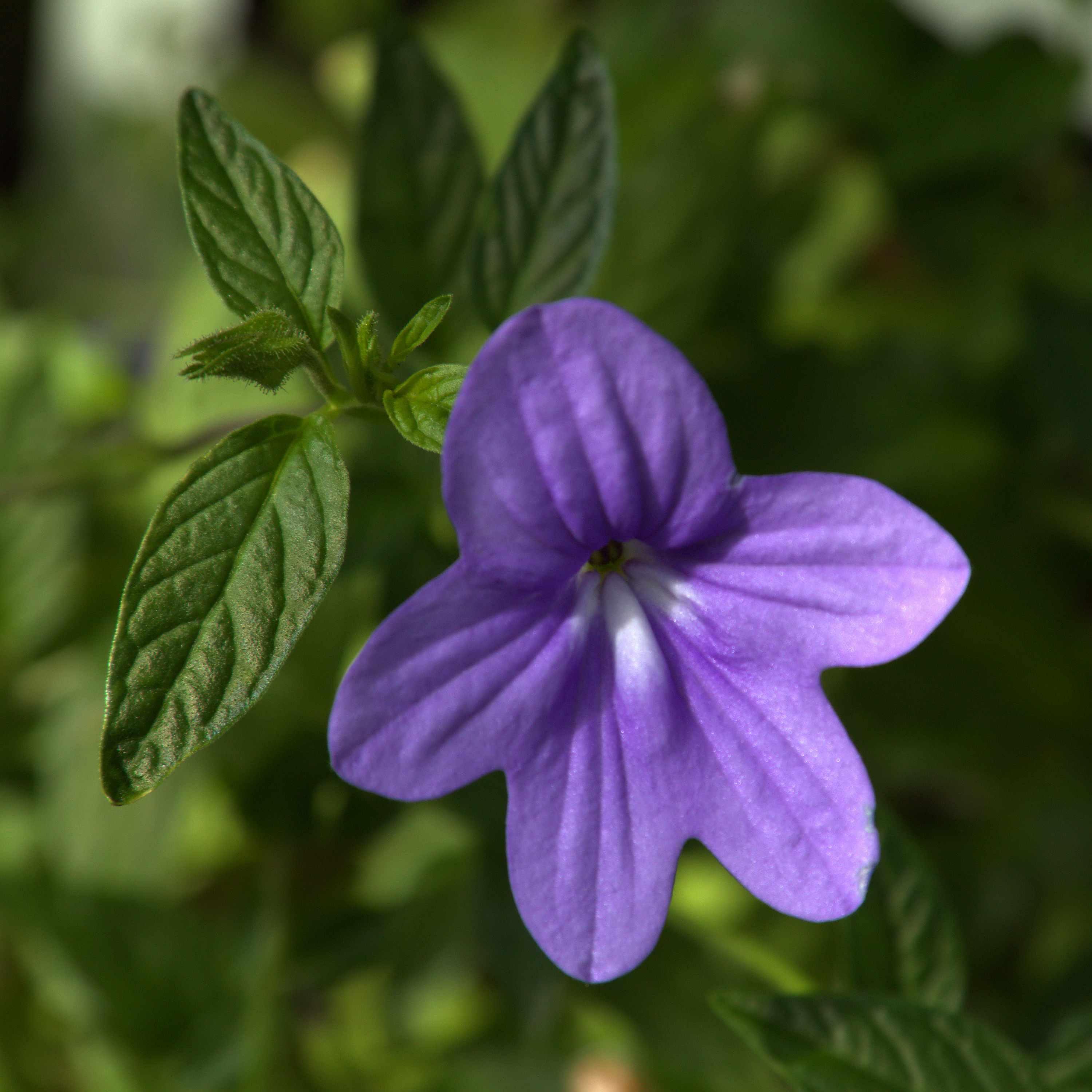 Browallia speciosa at Uppsala Botanic Gardens